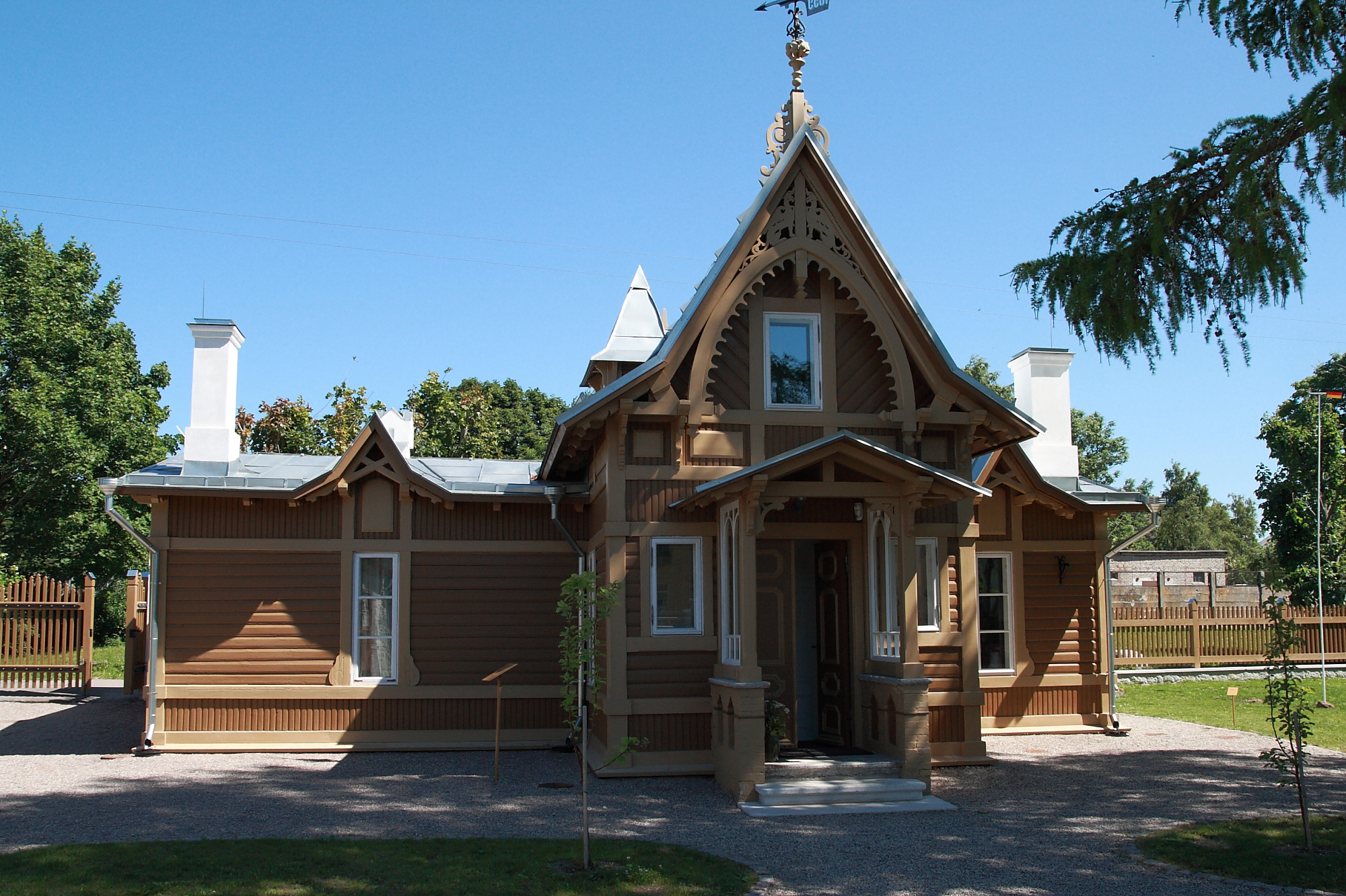 Paldiski, maja, kus elas ja töötas Amandus Adamson